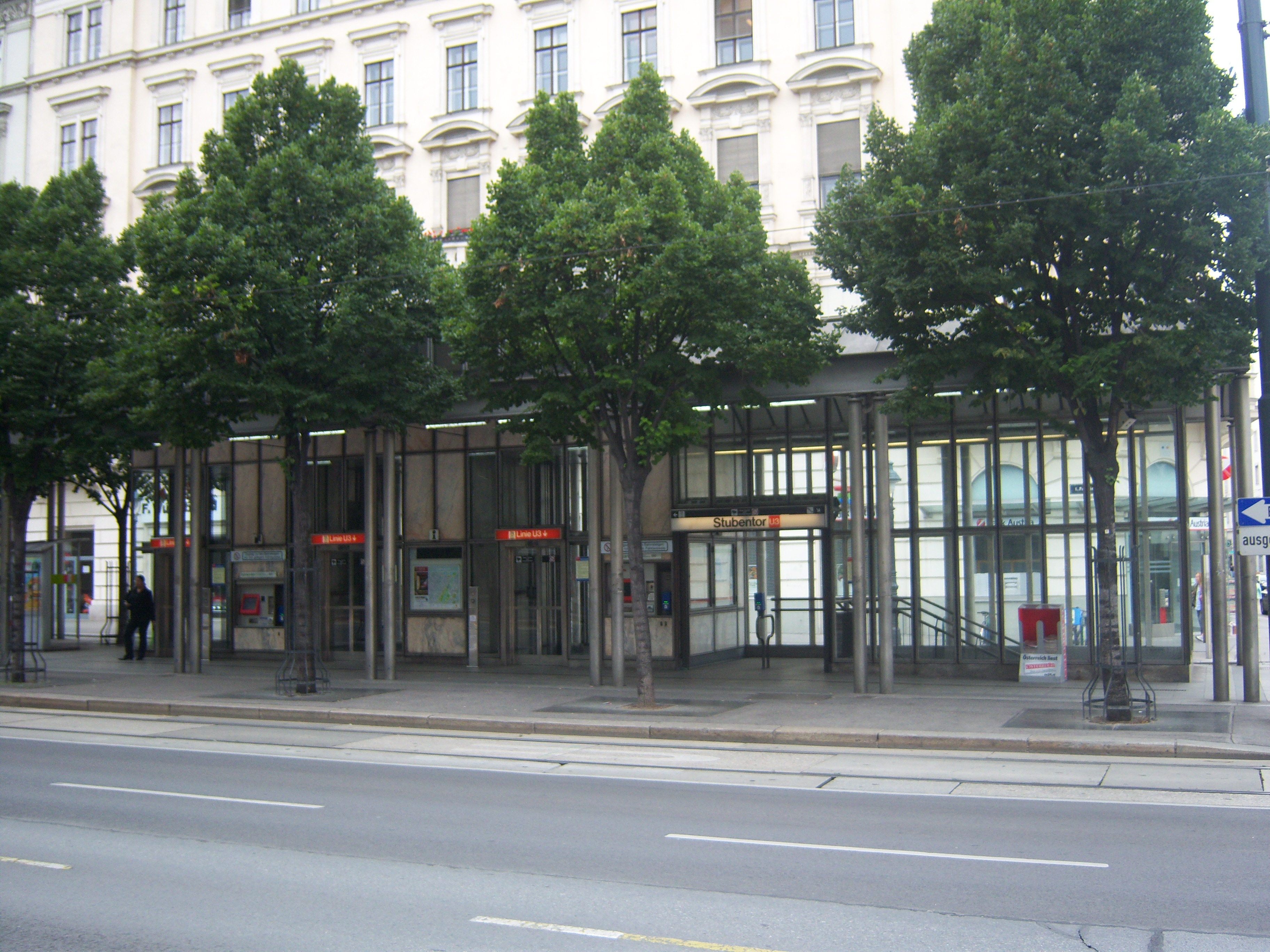 U-Bahn-Station Stubentor